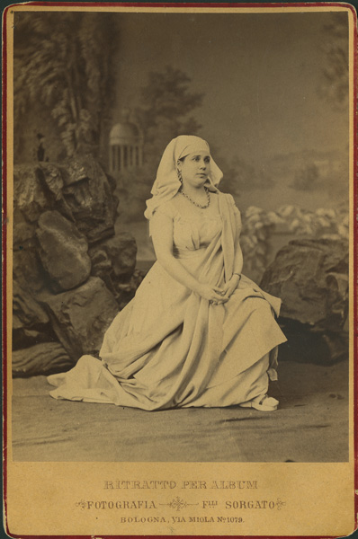 Cabinet. Amalia Ramírez en el Moises de Rossini.